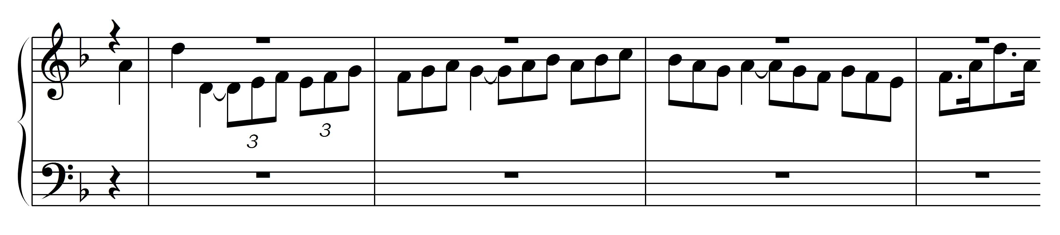 Bach, JS, Incipit Contrapunctus 13,1, BWV 1080